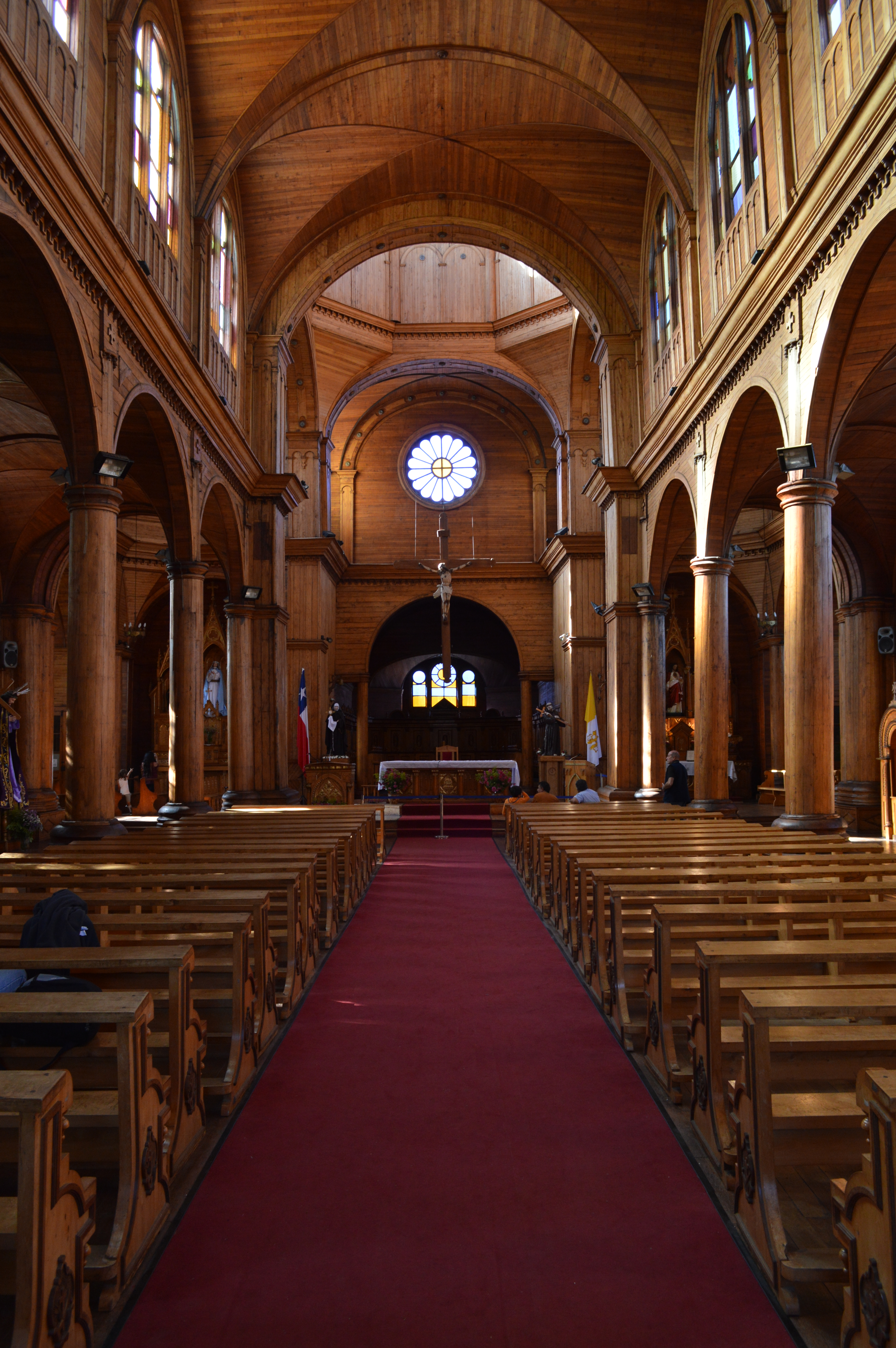 Vista desde la entrada principal a la Iglesia de Castro